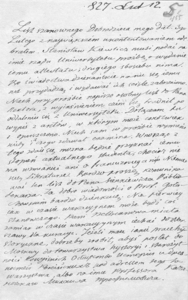 Автограф письма И. Н. Лобойко